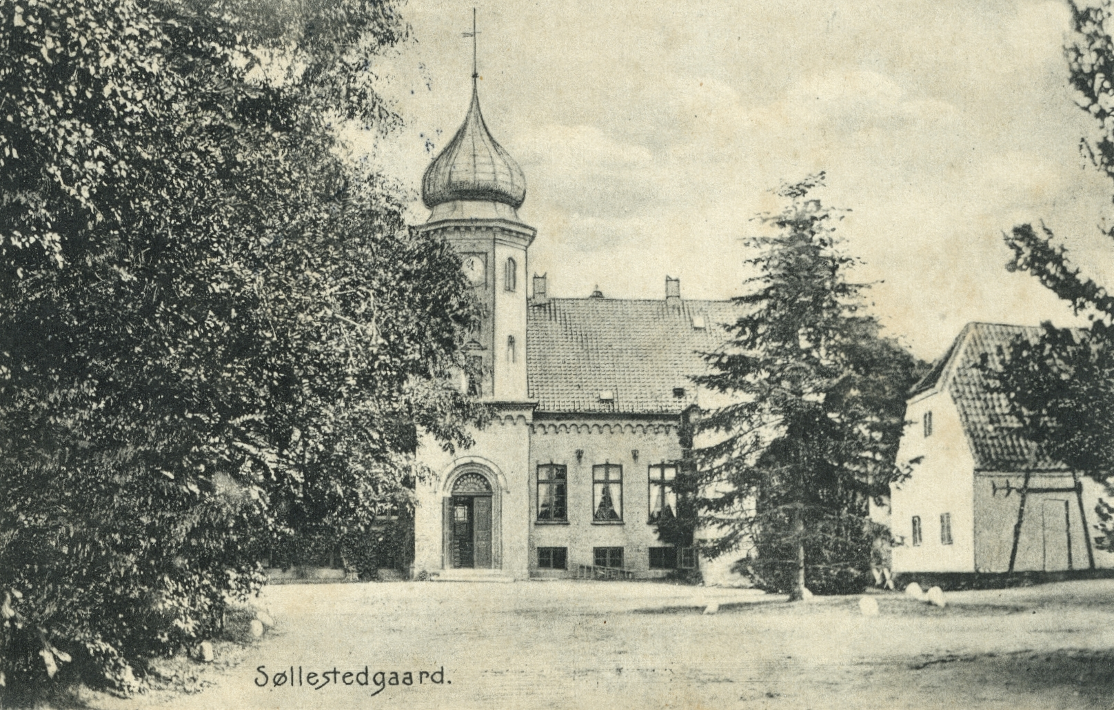 Søllestedgård